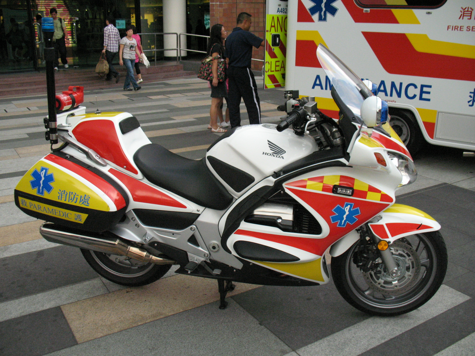 中文（香港）: 香港消防處救護總區從2009年起，引入新一代急救醫療電單車，型號為本田ST1300P，此摩托車原本是交通警察巡邏用途，現在是緊急救護用途。